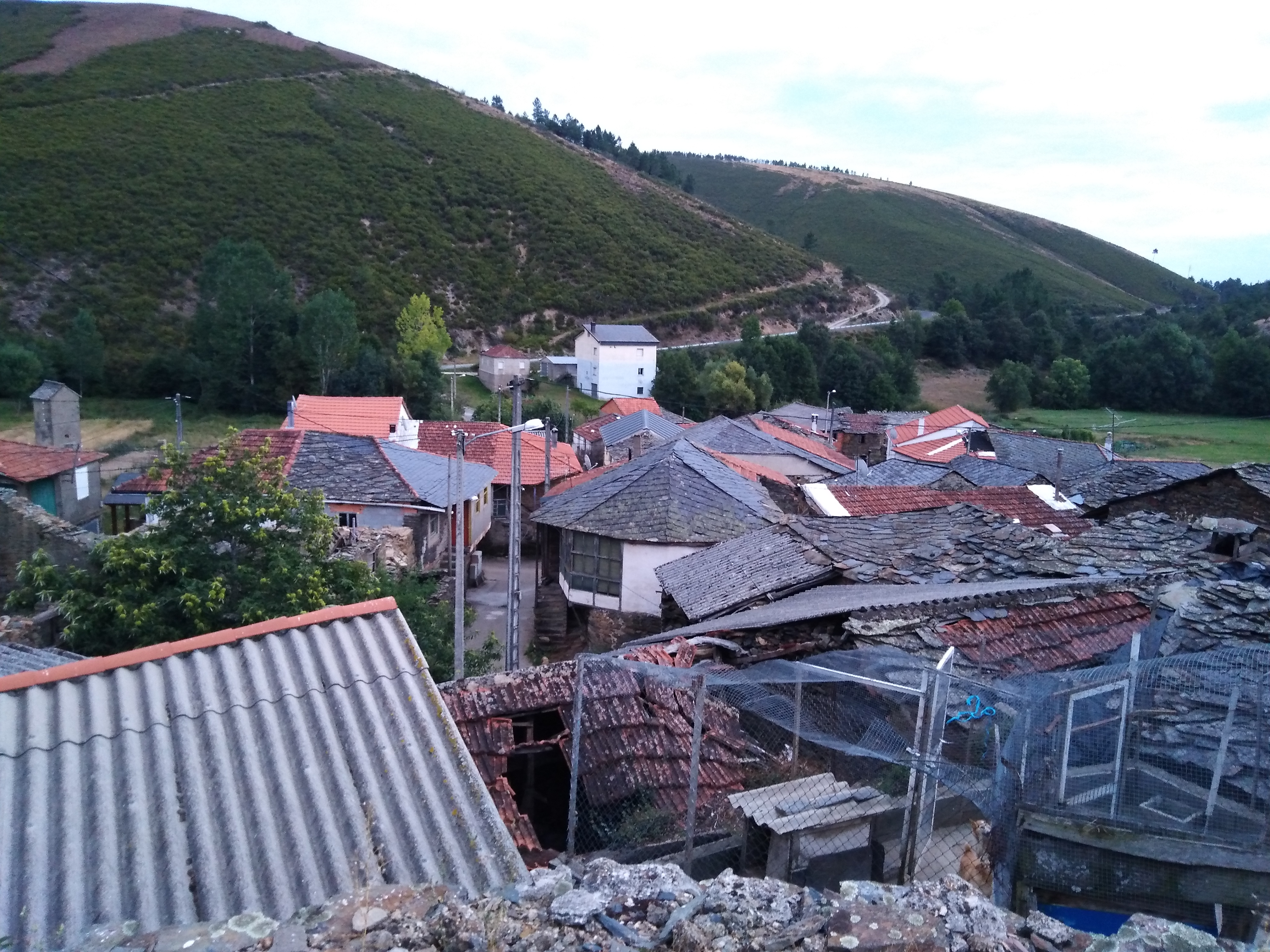 Vista de Parada da Serra (A Gudiña)